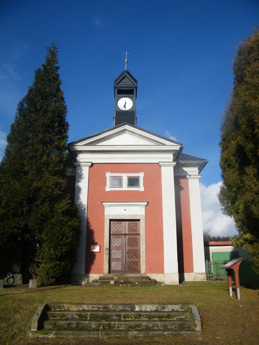 Kaple Panny Marie Karmelské ve Vlčí Hoře po rekonstrukci